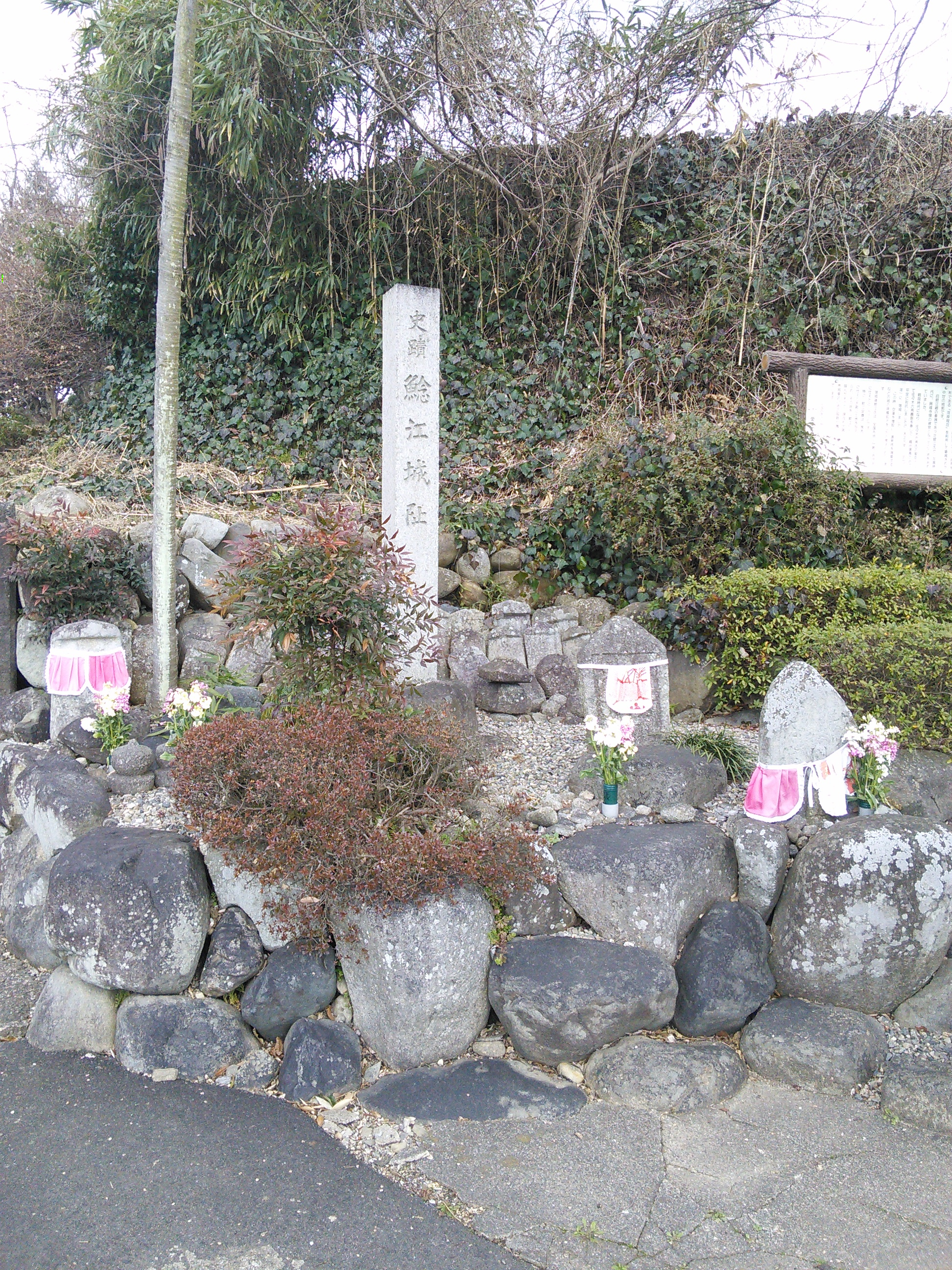 現在の鯰江城跡。土塁の跡が見える